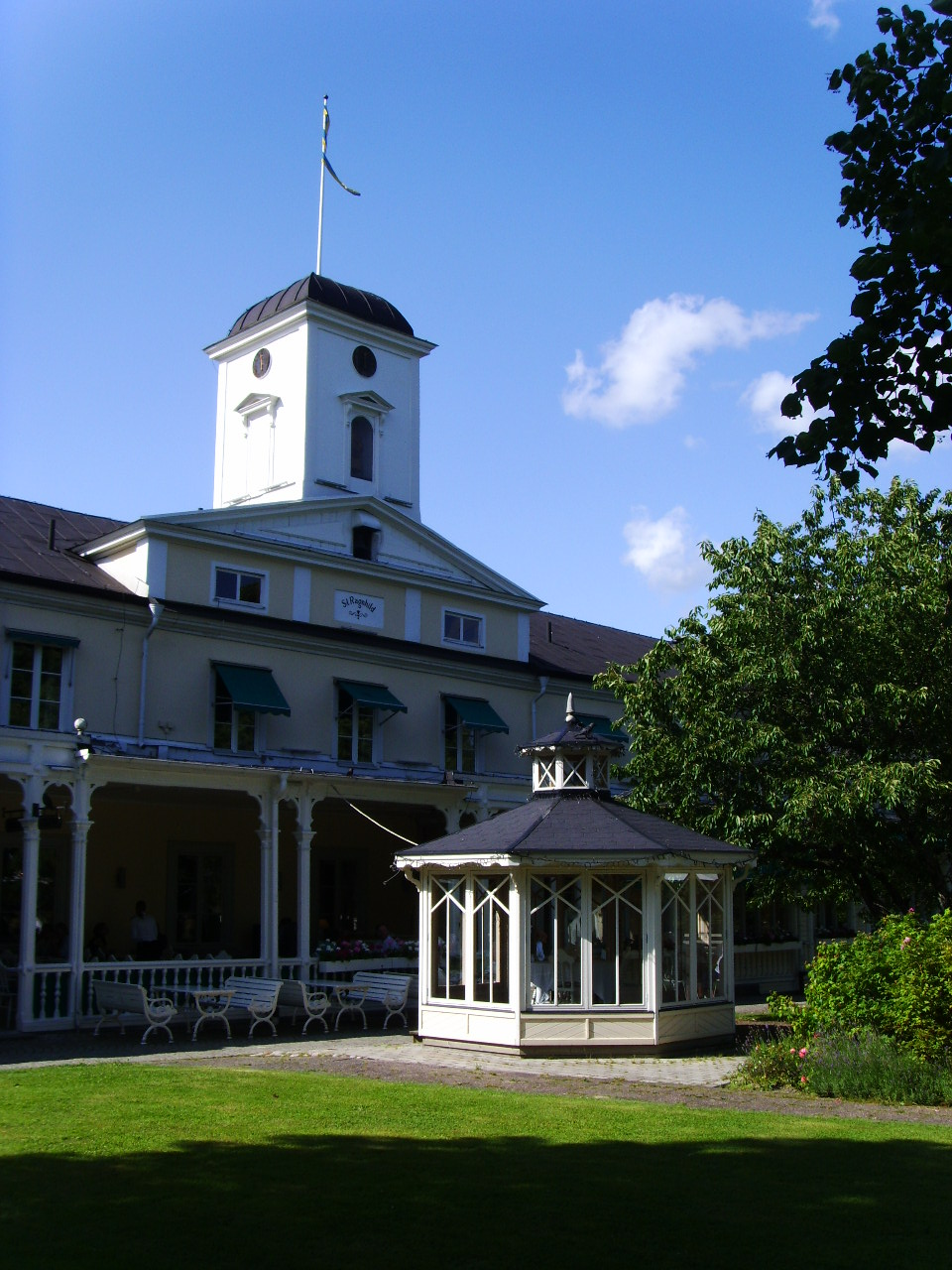 Söderköpings brunn